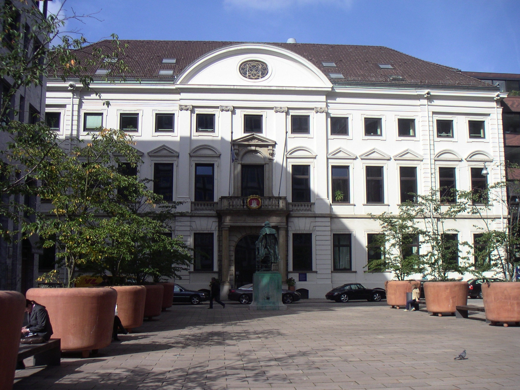 Goertz-Palais, Neuer Wall 68This is a photograph of an architectural monument.